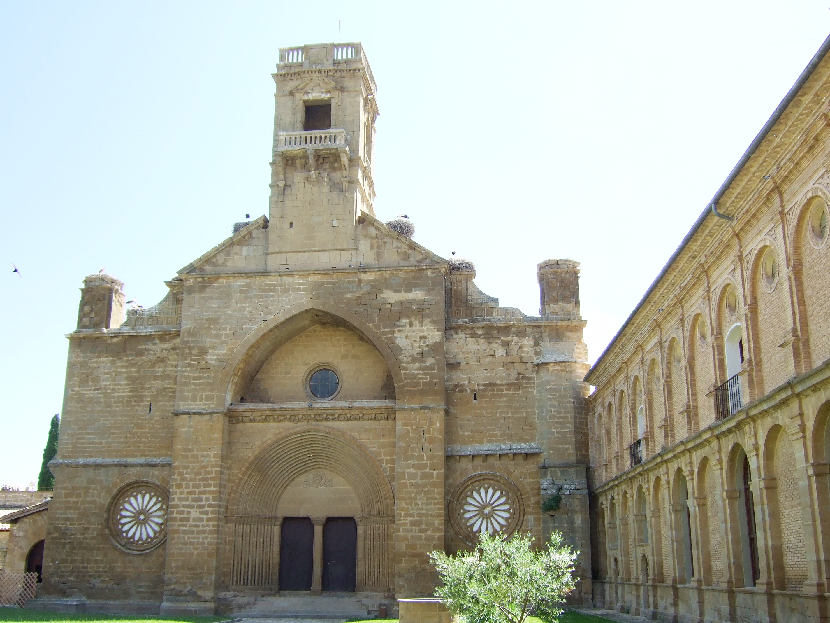 Monaterio de la Oliva - Fachada de la iglesia abacial - Finales del siglos XIII, principios del XIV